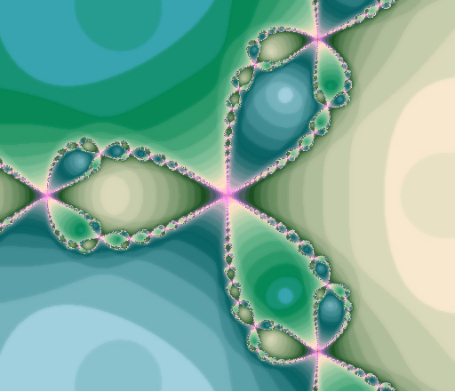 Newton - (Newton-Raphsons metod för rotutdragning), (en fraktal). Andra bilder i samma serie: Icke linjära fraktaler: Bild:Mandelbrotmängden stor.jpg|right|thumb|Mandelbrotmängden Bild:Juliamängden vid koordinaten (-0.120464 ,0.649222).jpg|right|thumb|Exempel på Juliamängden Bild:Juliamängd stor.jpg|right|thumb|Exempel på den tomma Juliamängden Kategori:Bilder av fraktaler